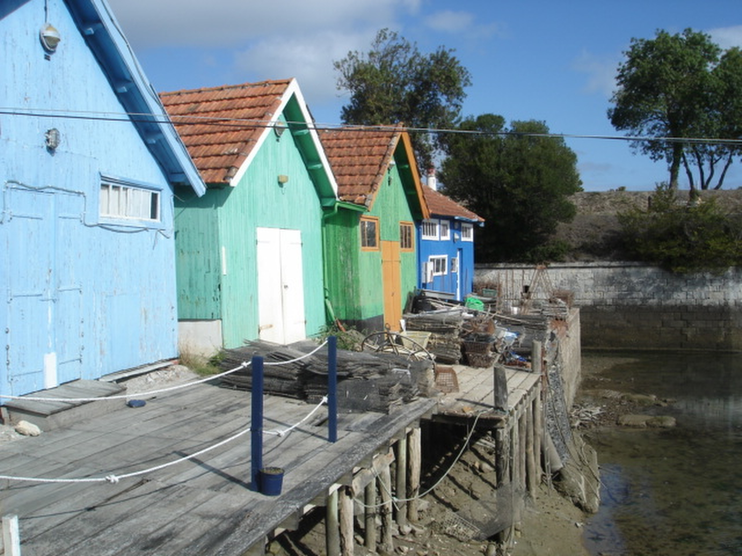 Cabanes multicolores d'ostréiculteurs au Château d'Oléron (Charente-Maritime, France).